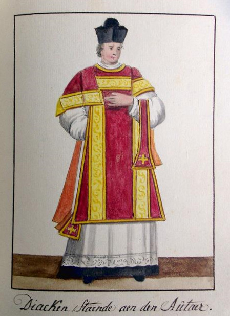 Old manuscript Ghent